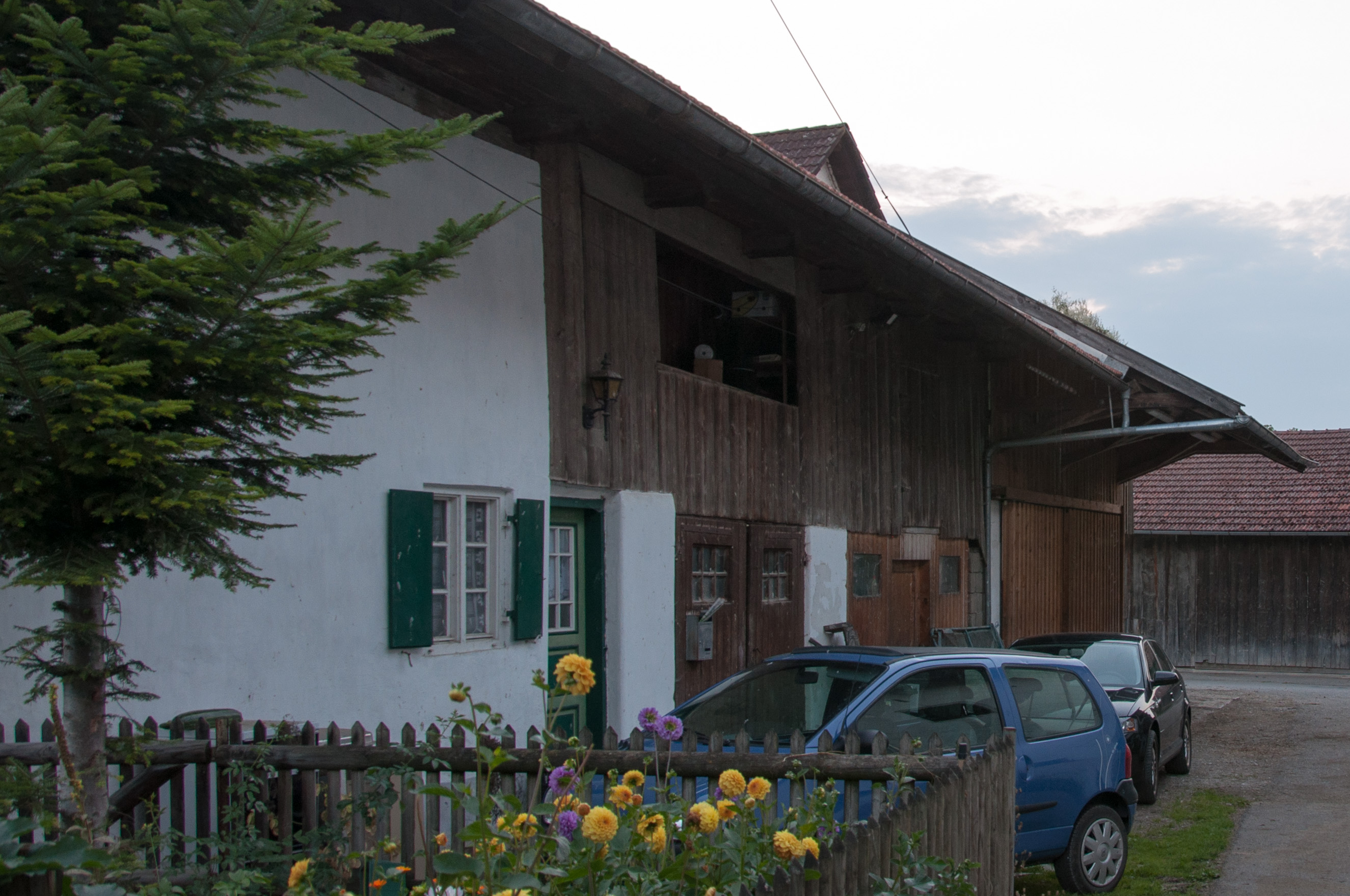 Ehemaliges Getreidekasten, zweite Hälfte 17. Jahrhundert; im Obergeschoss des Nebengebäudes.This is a photograph of an architectural monument.